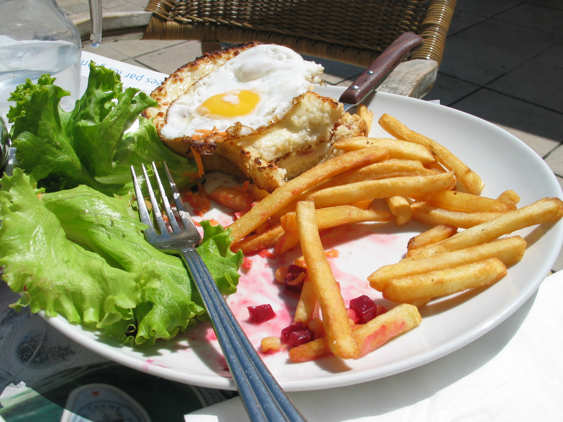 Assiette croque-madame crudités frites.